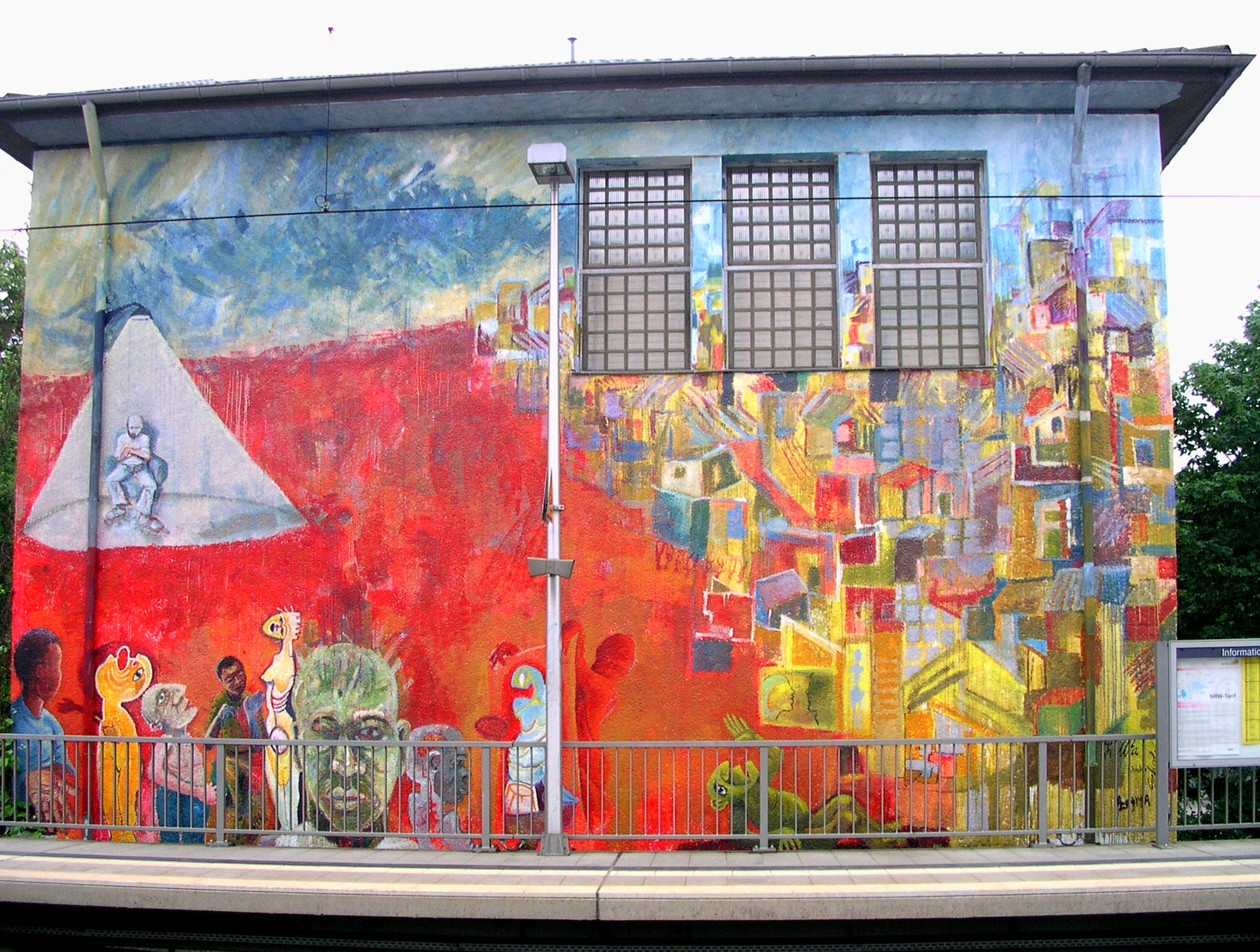 Aachen, Graffiti am Haltepunkt Schanz